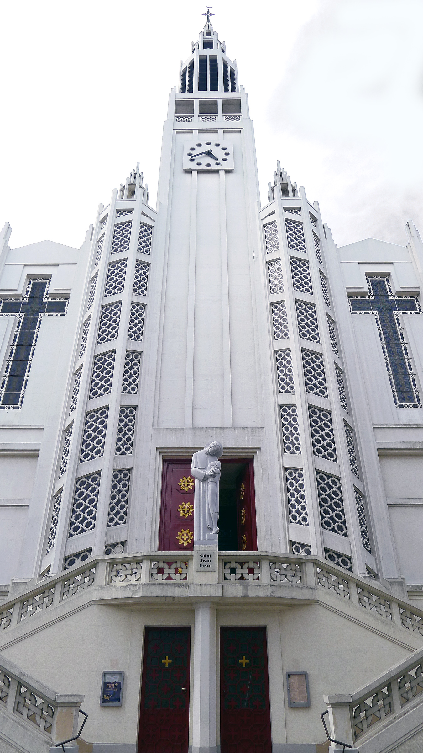 Église Saint-Jean-Bosco (Inscrit) - n° 77,79 rue Alexandre-Dumas - Paris XX .